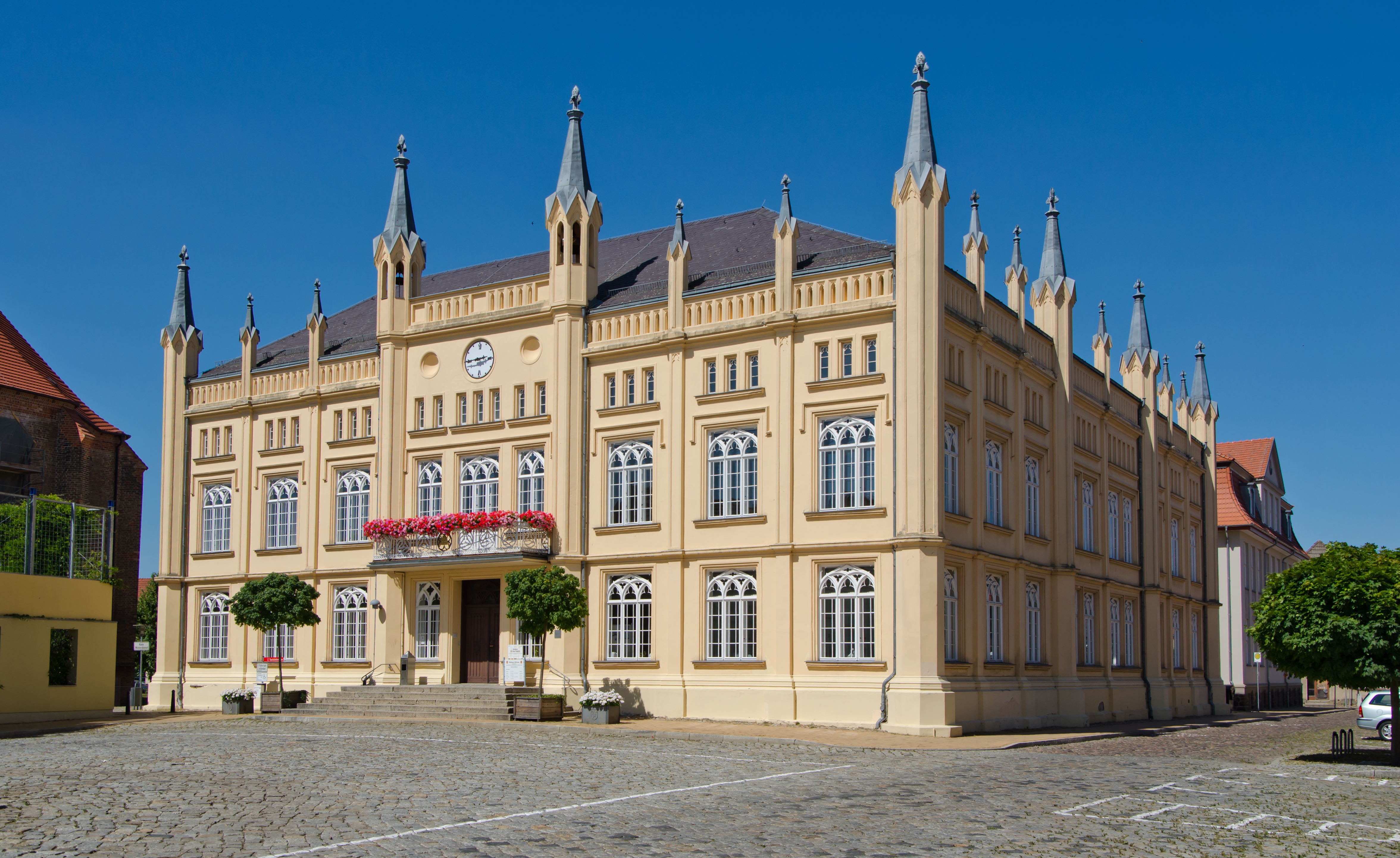 Bützow Am Markt 10 Rathaus